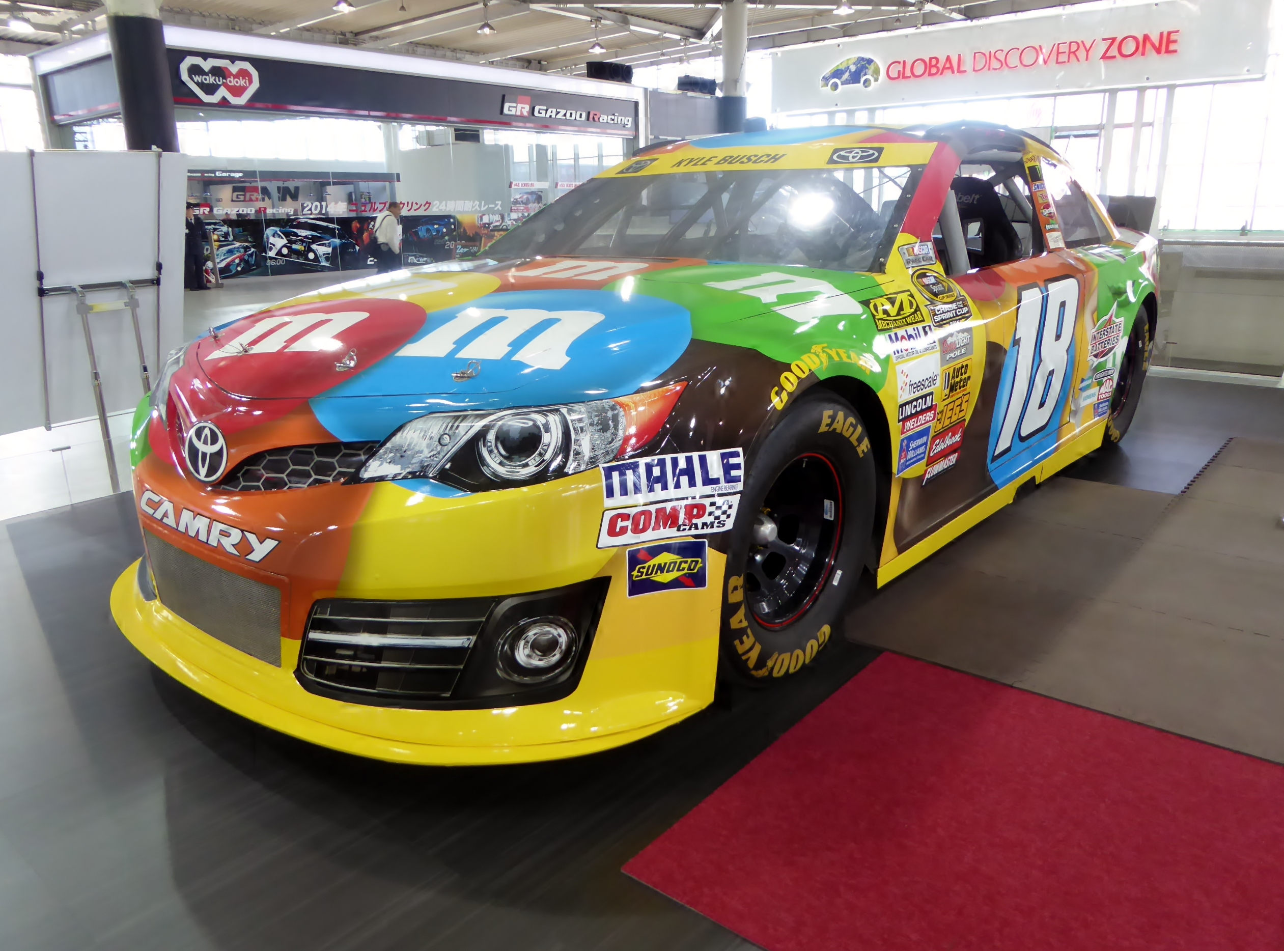 ナスカー仕様のトヨタ・カムリの18号車をフロントから撮影。